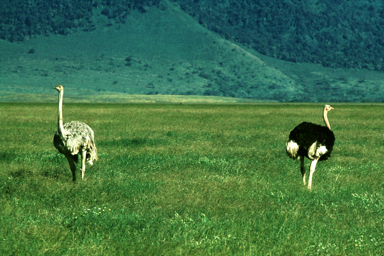 Massai-Strauße